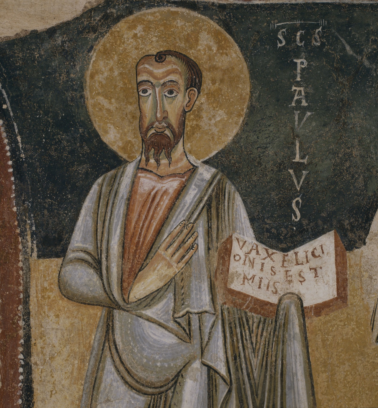 Az eredeti fotót Emilio J. Rodrigez Posada készítette és töltötte fel Flickr-n keresztül Ez az eredet kép egy részlete